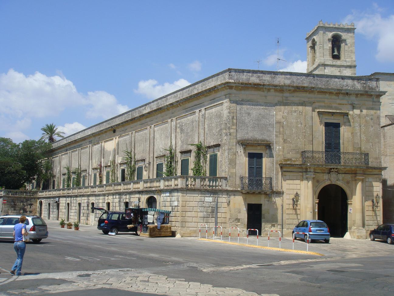 Palazzo Episcopo fronte piazza